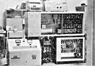 EMAL-2